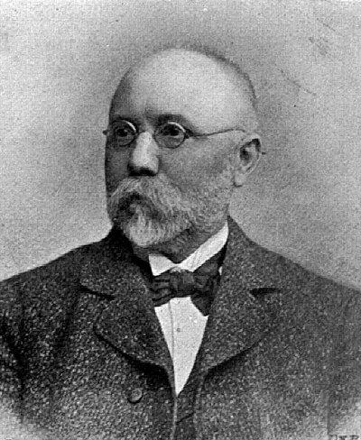 František Bačkovský (1854 - 1909), Český knihkupec, nakladatel a spisovatel.